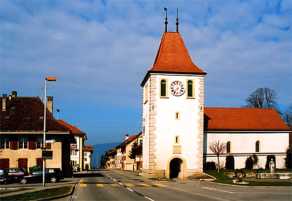 Cudrefin: Kirche mit dem Turm, der einst ein Wehrturm der Stadtbefestigung war.